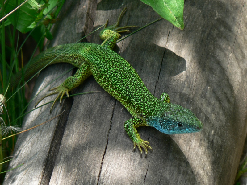 Lacerta viridis